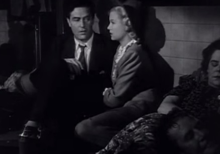 ロンドンの地下鉄駅で夜を明かすニールとカーラ